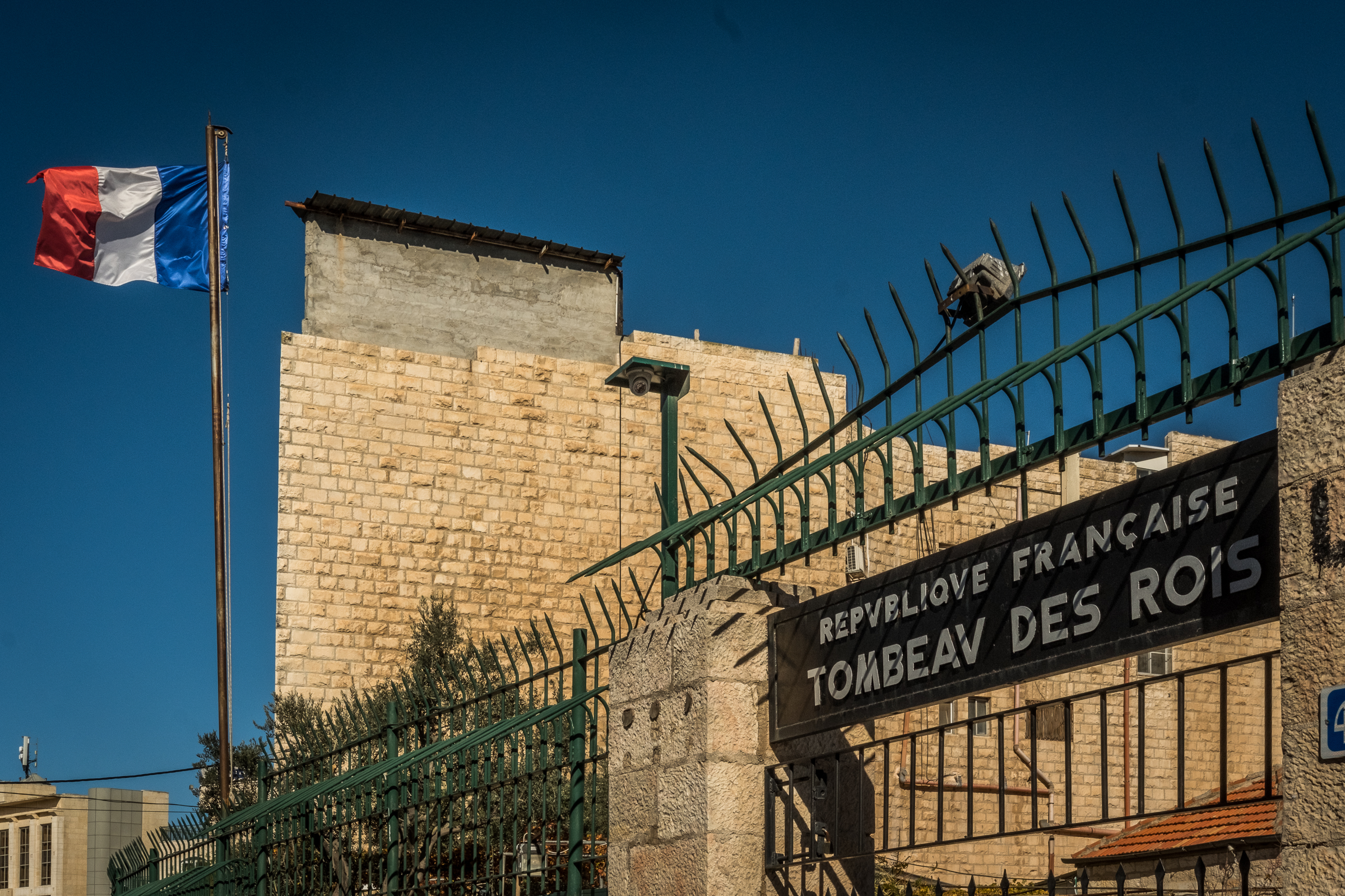 Tombeau des rois à Jérusalem décembre 2019.